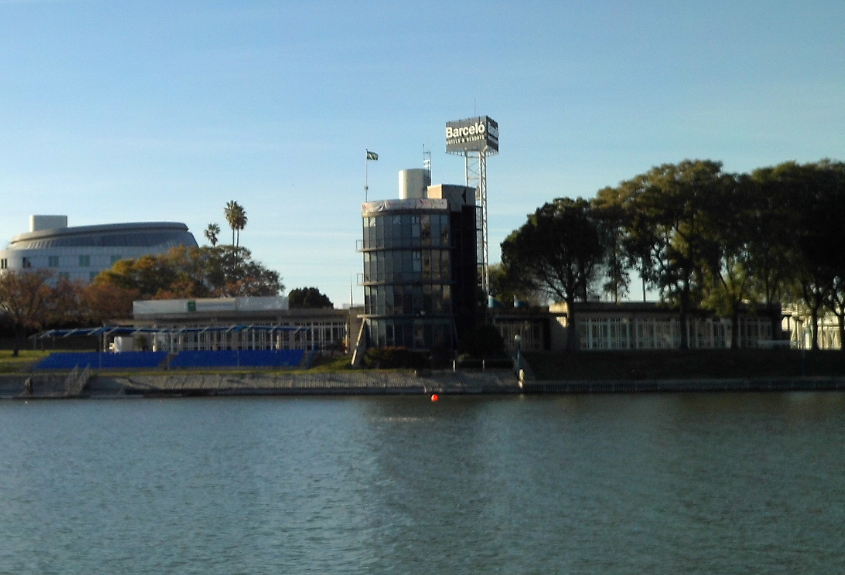 Centro Especializado de Alto Rendimiento de Remo y Piragüismo de la Cartuja. Sevilla, Andalucía, España.